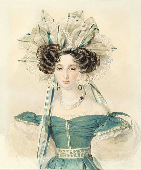 "Портрет Е.К.Воронцовой" около 1823 г